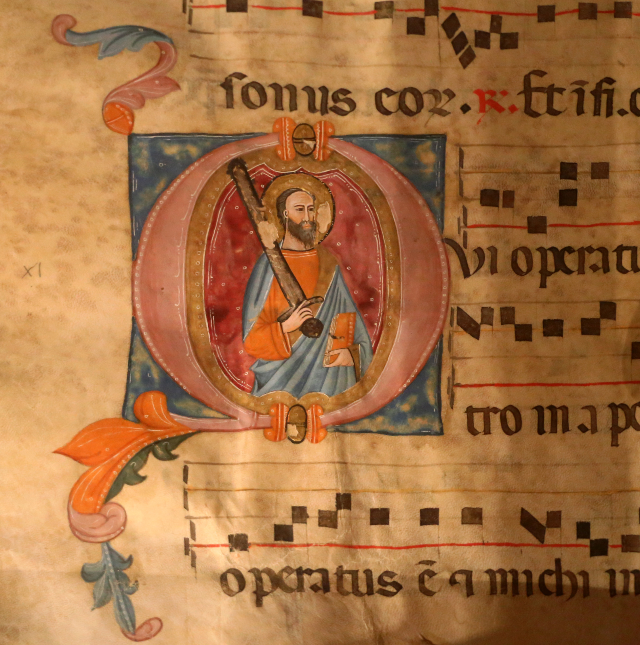 Piazza Santa Maria Maggiore This is a photo of a monument which is part of cultural heritage of Italy.